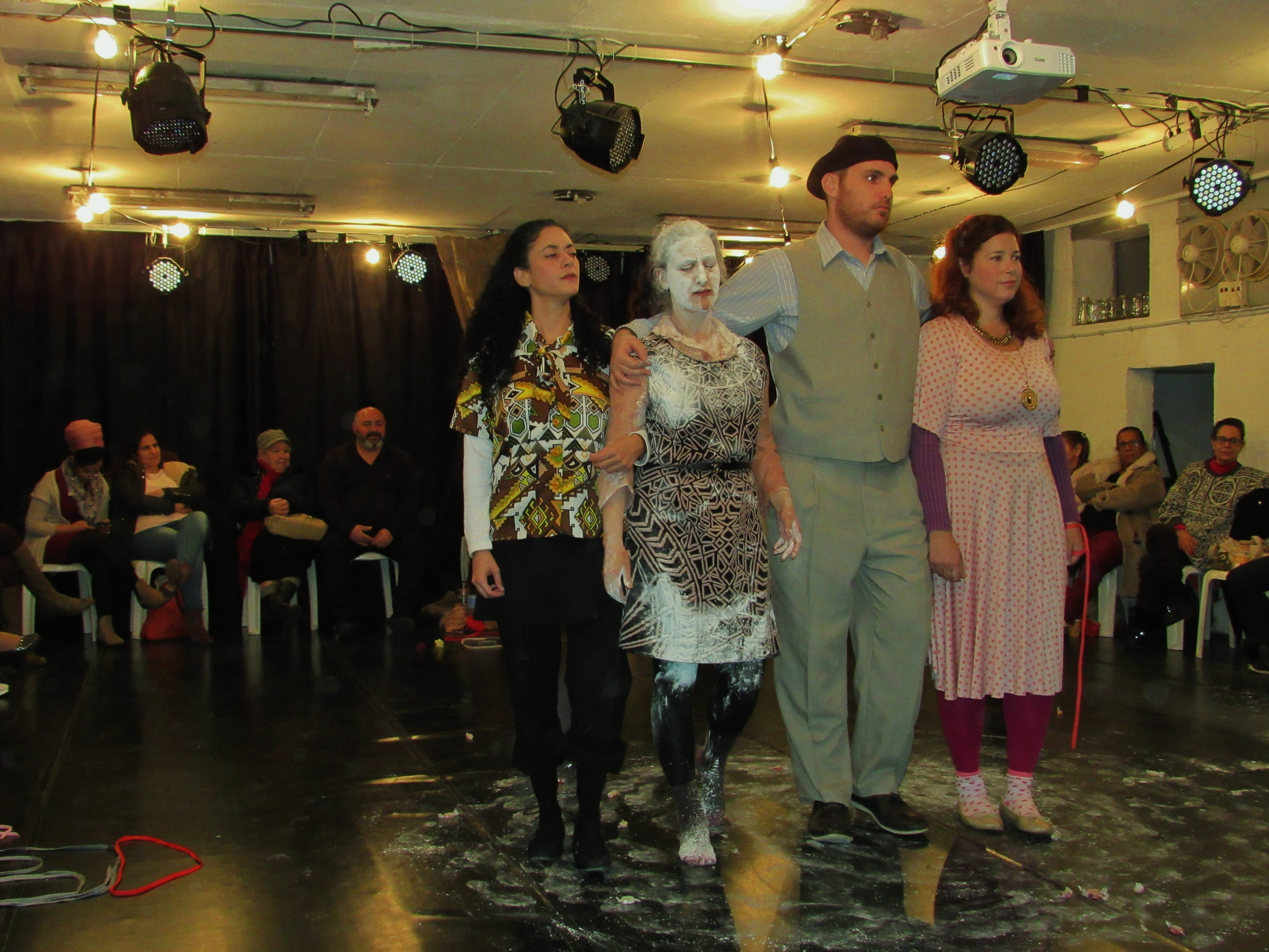 הצגת תלושים